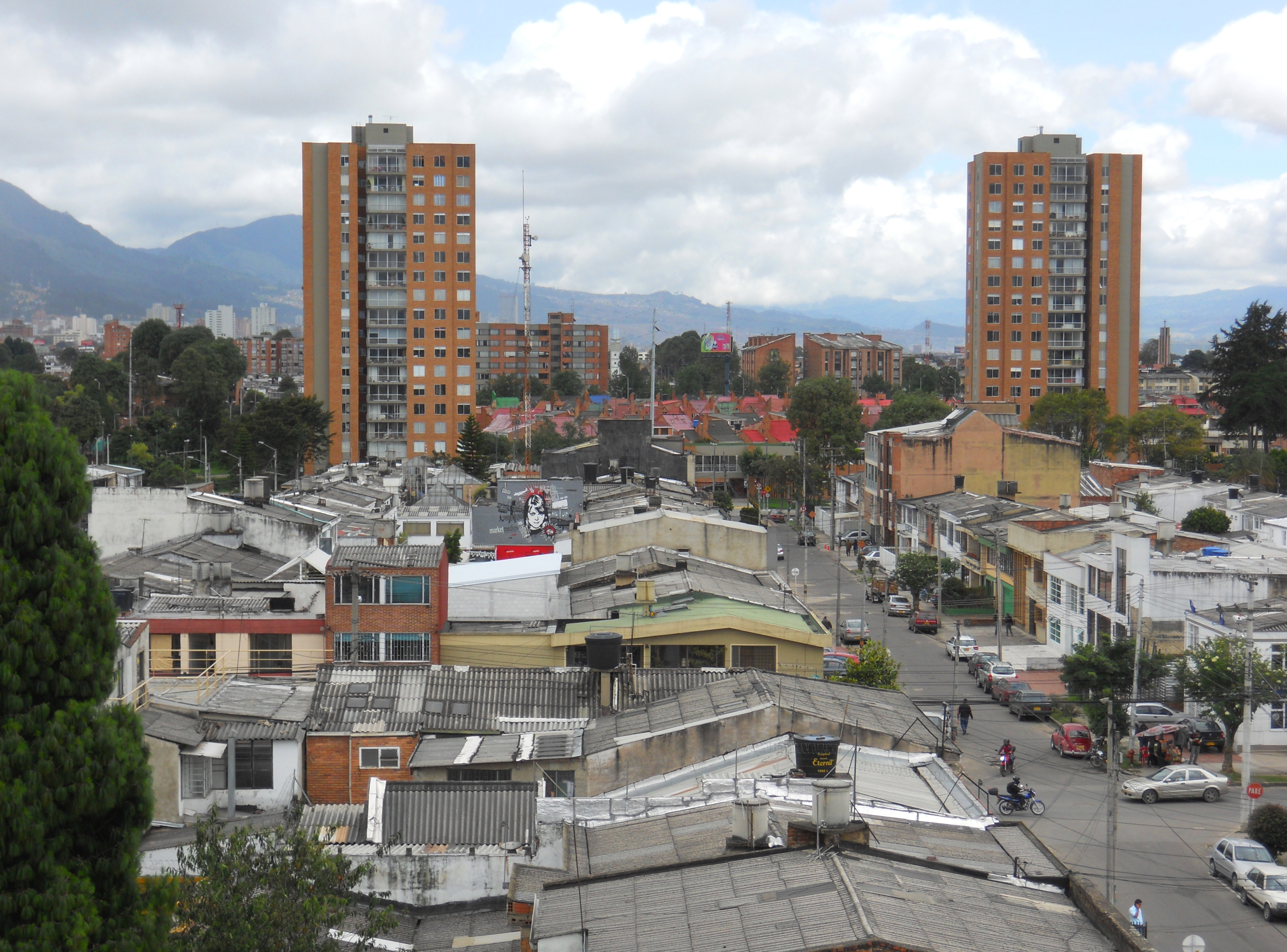 Bogotá, localidad de Barrios Unidos, barrio La Castellana, panorámica desde la carrera 49 con calle 92.